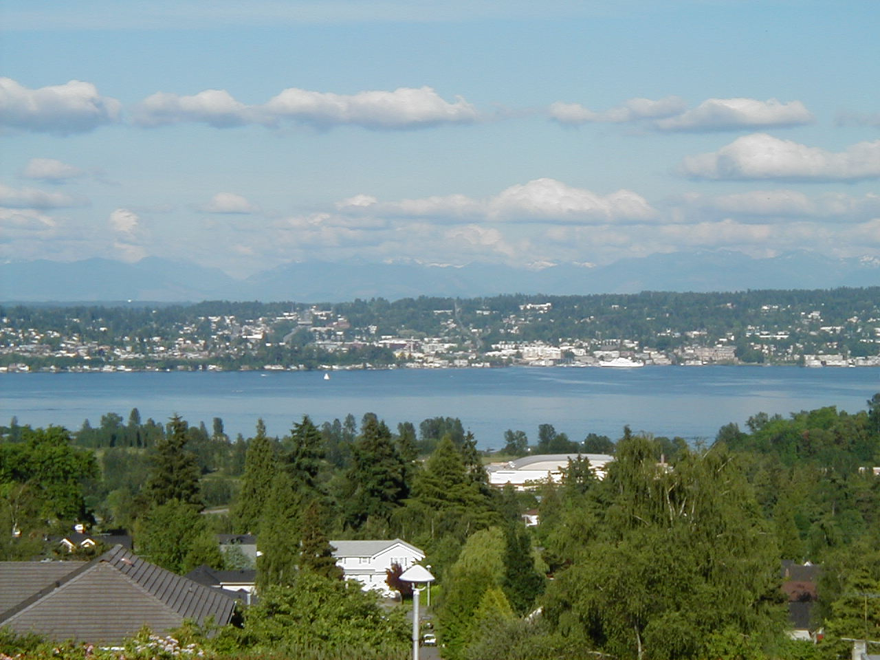 Lake Washington